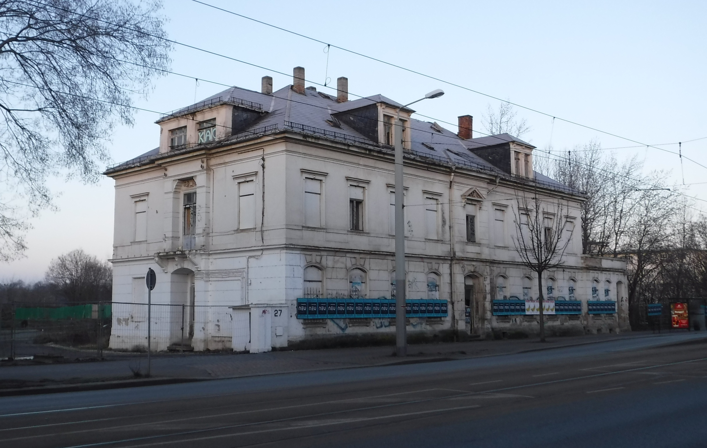 Villa Leipziger Straße 27 in Dresden; Blick von Osten